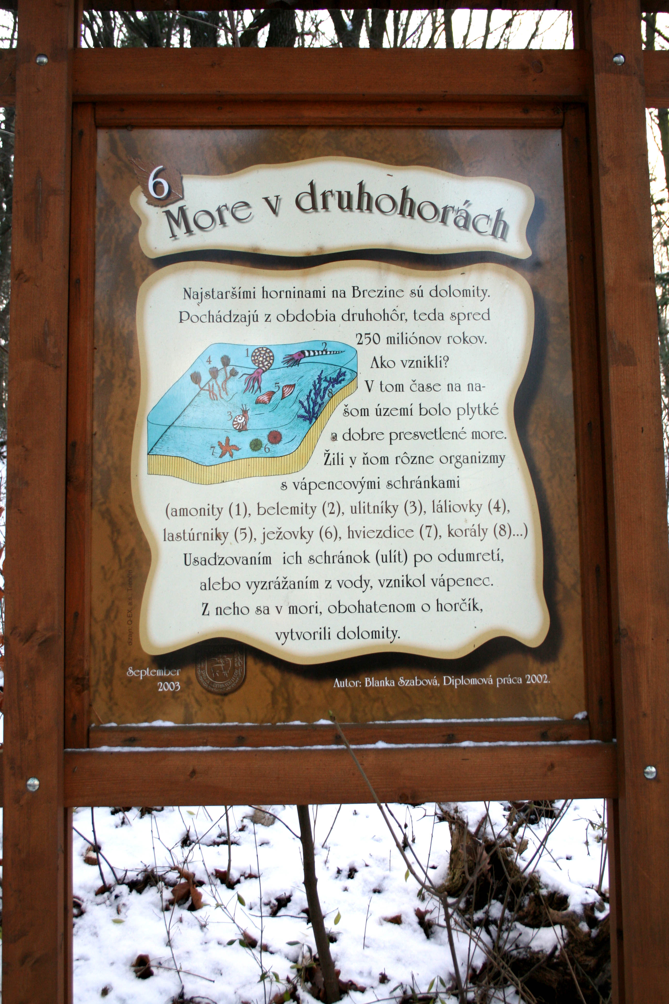 Informačná tabuľa z trenčianskej Breziny